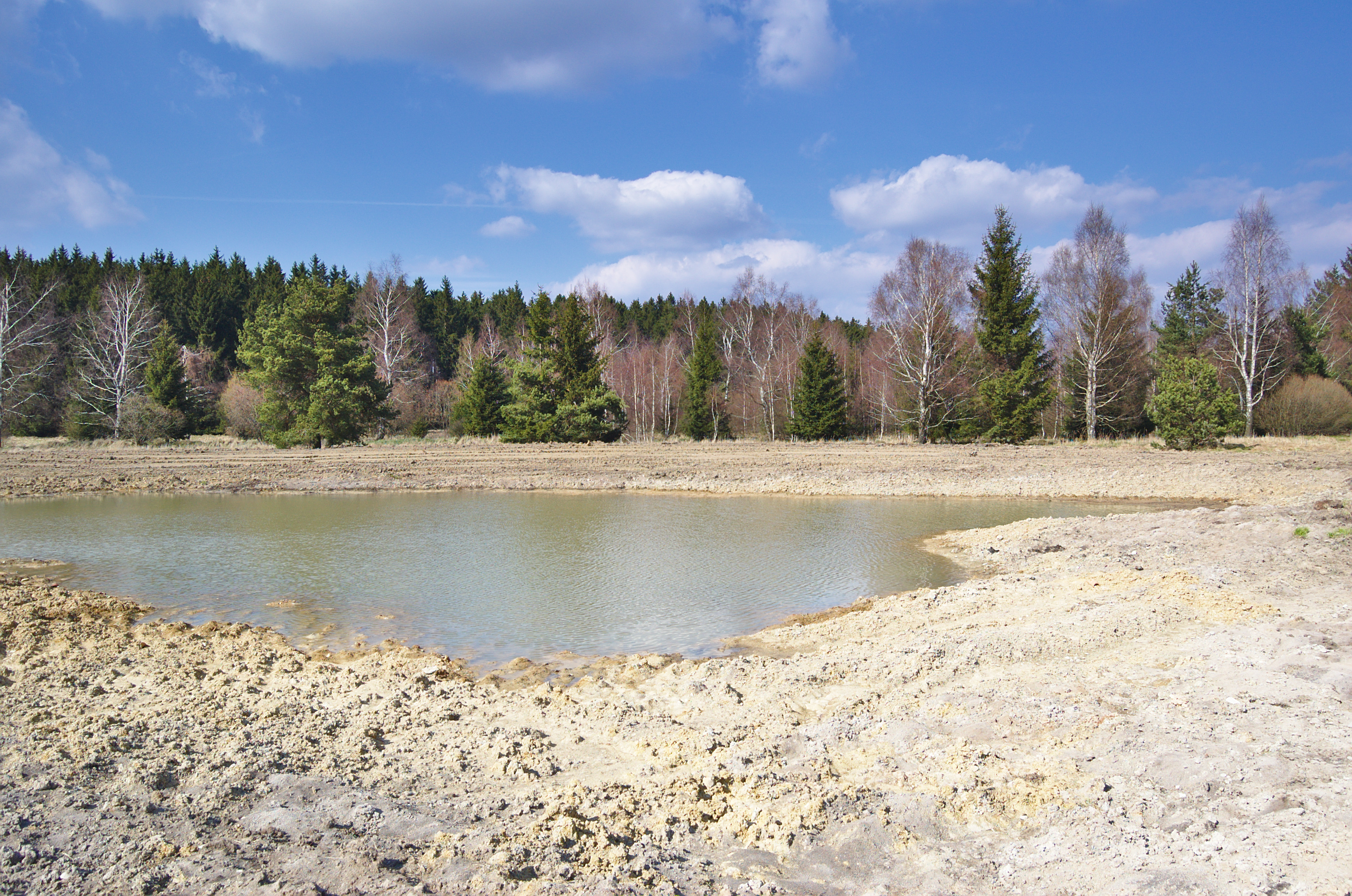 Nově budovaný rybník v přírodní rezervaci Pavlovské mokřady, okres Blansko